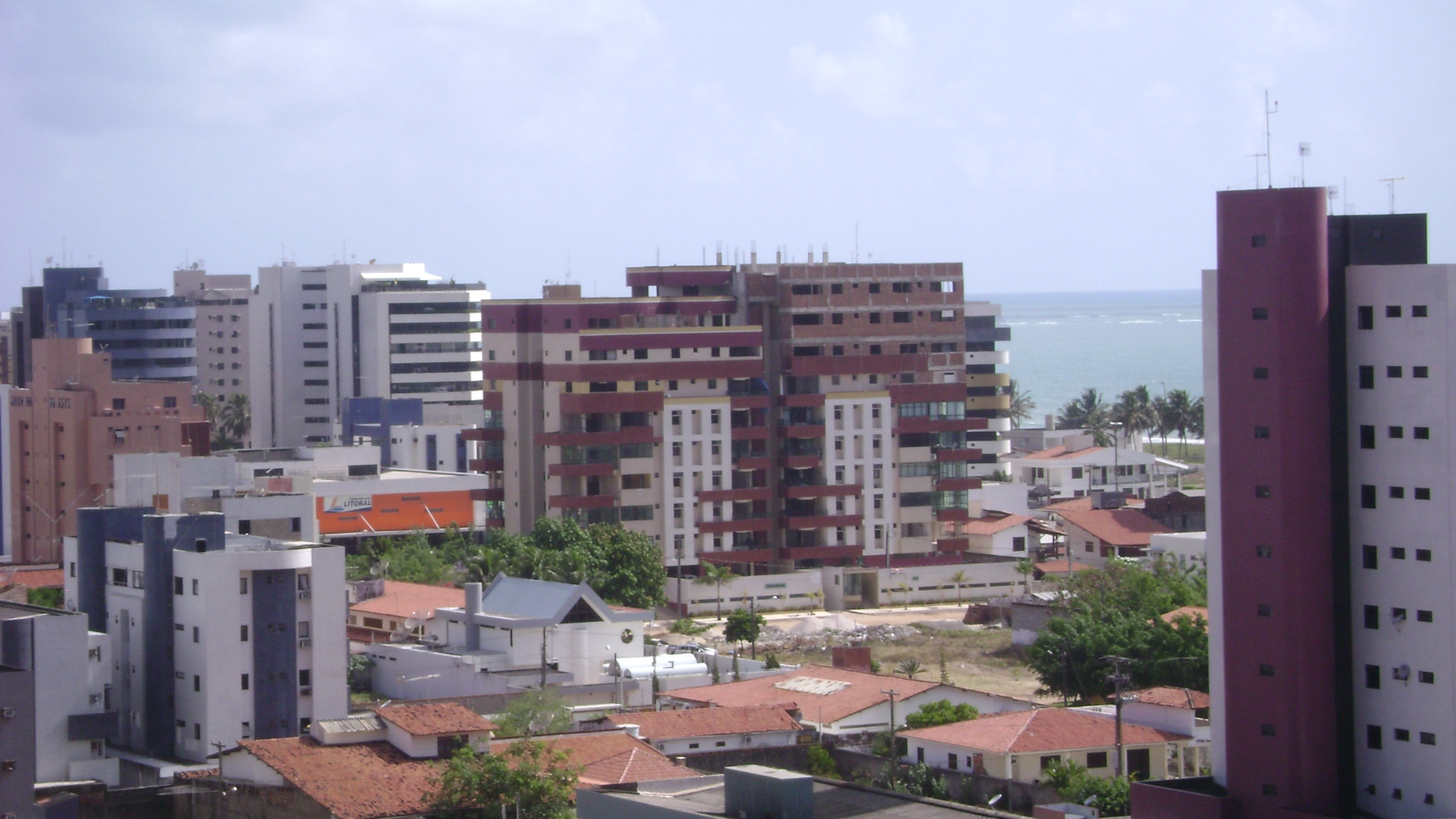 Prédios na praia do Intermares em Cabedelo, Paraíba, Brasil.